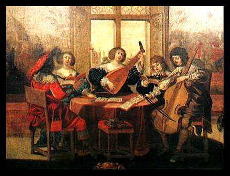 O assunto representa uma sociedadede músicos amadores mostrando: alaúde, viola da gamba e cantores.